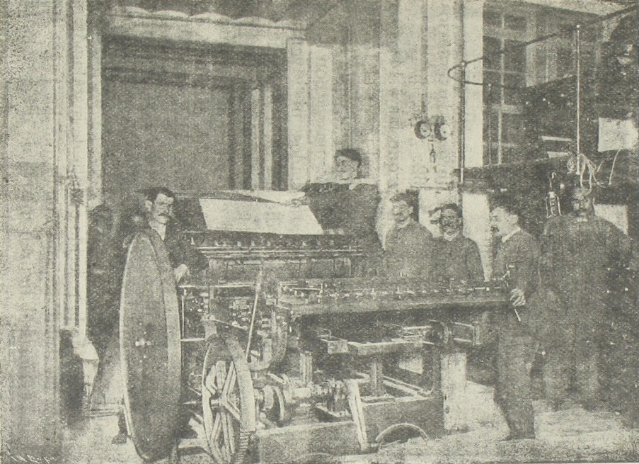 Talleres de "El Correo Español": Máquina "Alauzet" para impresiones planas